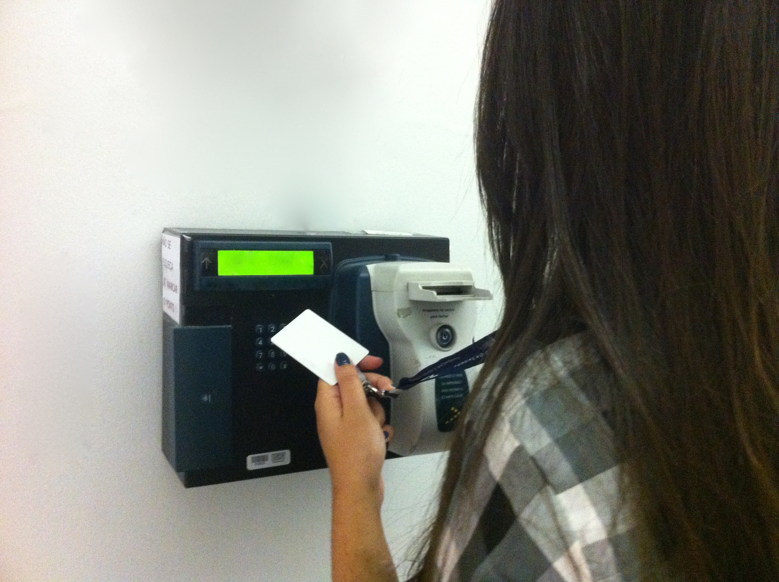 Equipamento usado para funcionários de empresas "baterem o ponto" e confirmarem que estão trabalhando dentro de um determinado horário e durante um tempo estabelecido.